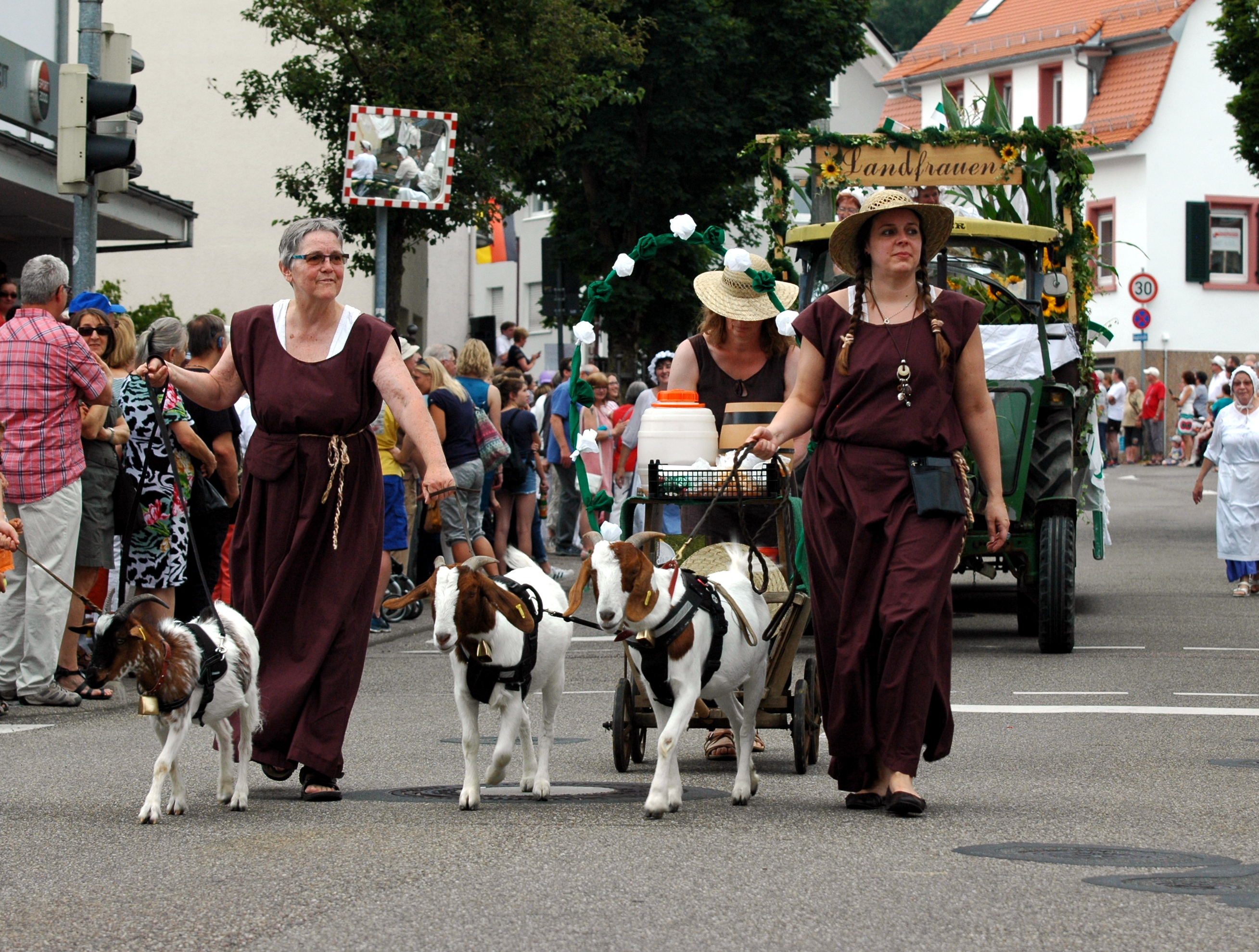 Jubiläumsumzug 1000 Jahre Bammental